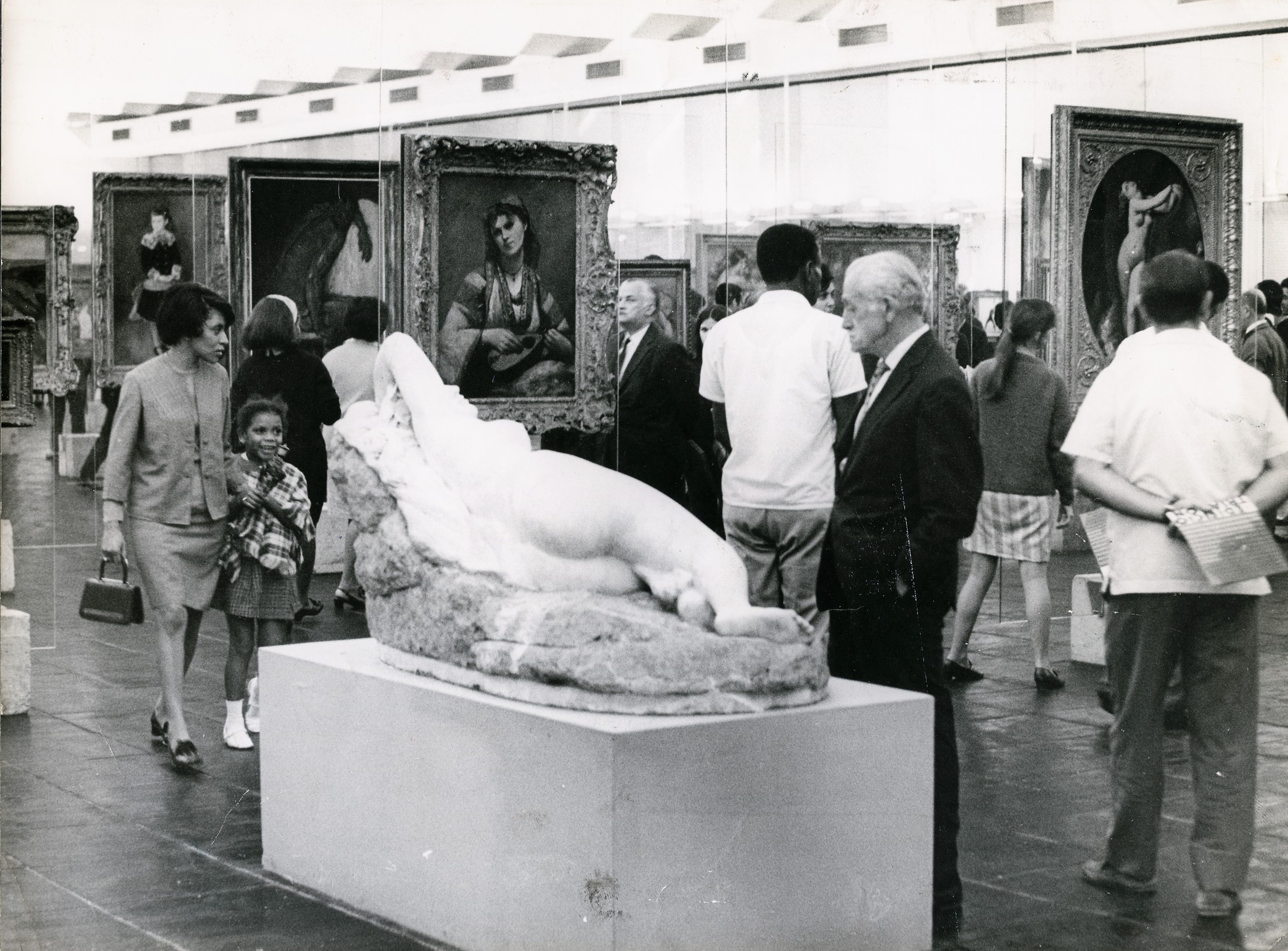 Fotografia do Fundo Correio da Manhã, sob a guarda do Arquivo Nacional.